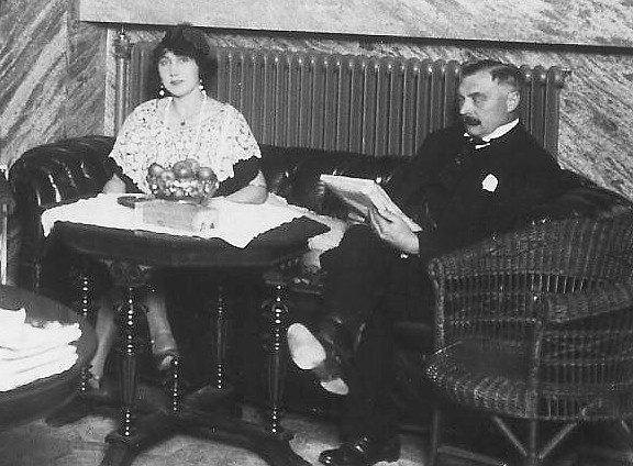 Odile och Theodor Lundberg i hallen på Edeby säteri